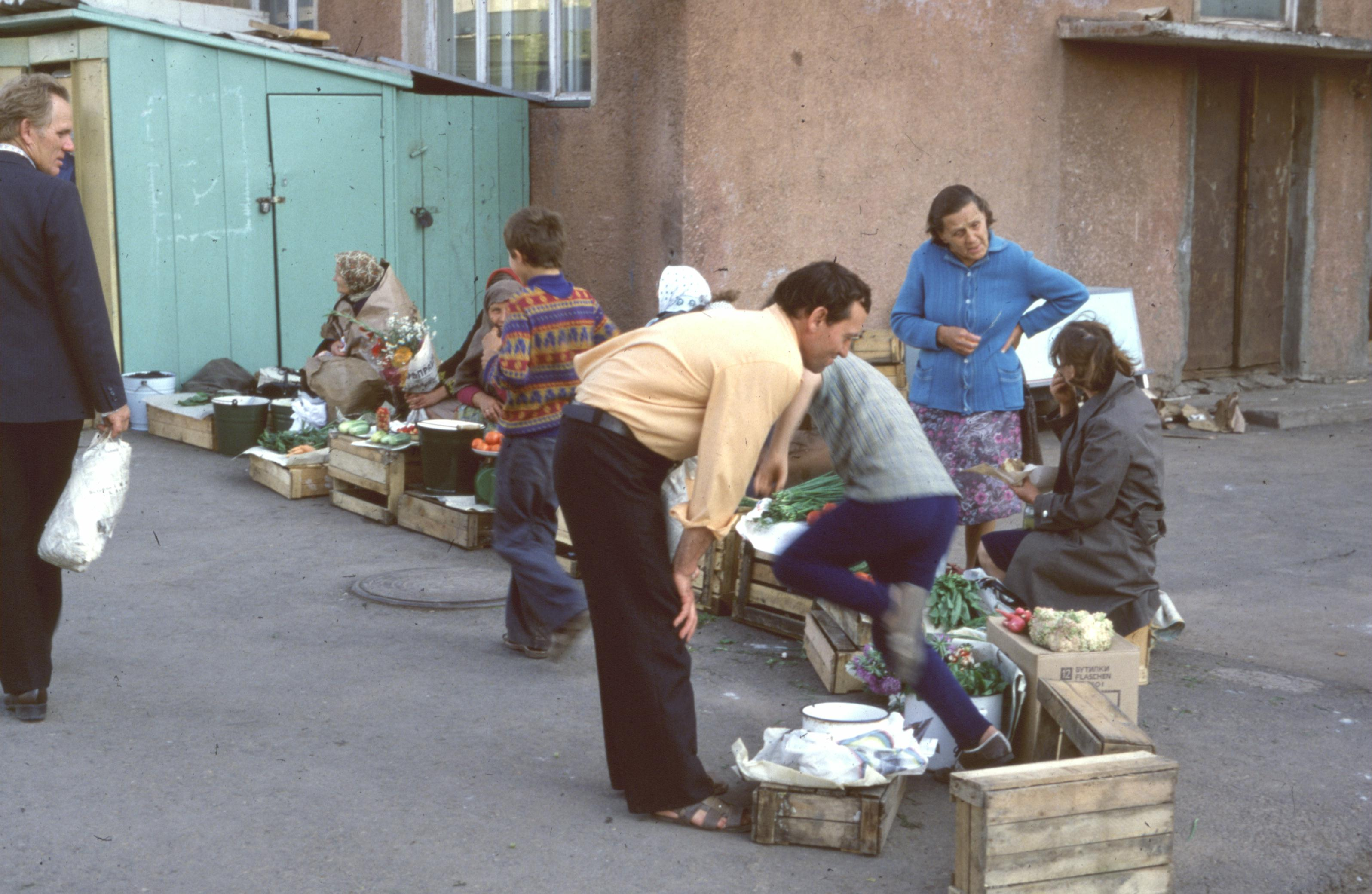 "Markt" in Bratsk, Sommer 1981